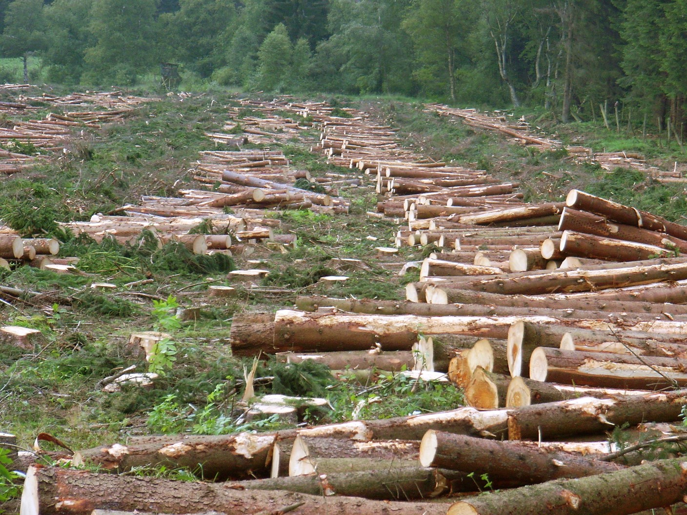 Holzstämme im Solling; Rauhbeuge